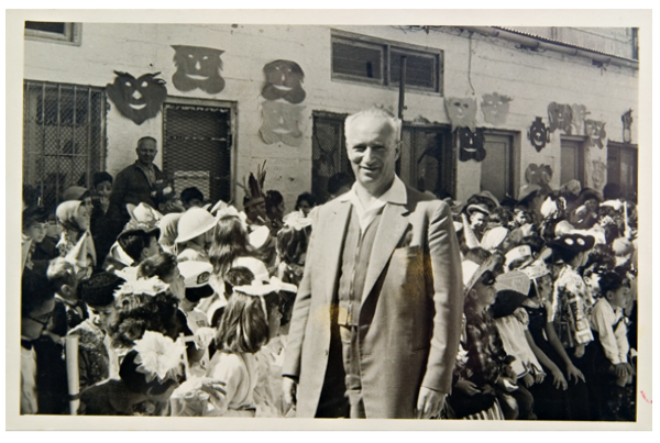 אליהו בייליס בחגיגת פורים בחצר ביה"ס א. ד. גורדון